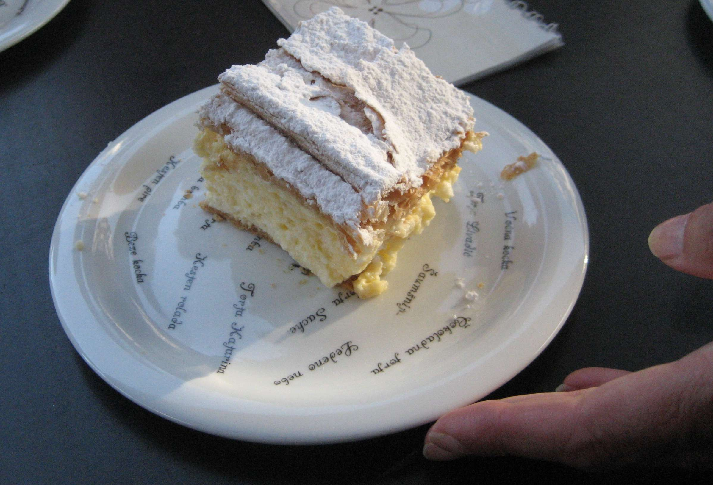 original Samoborska kremsnita